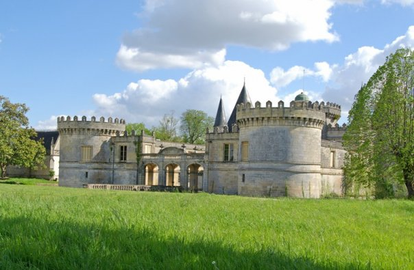 Photo du Château des Tours